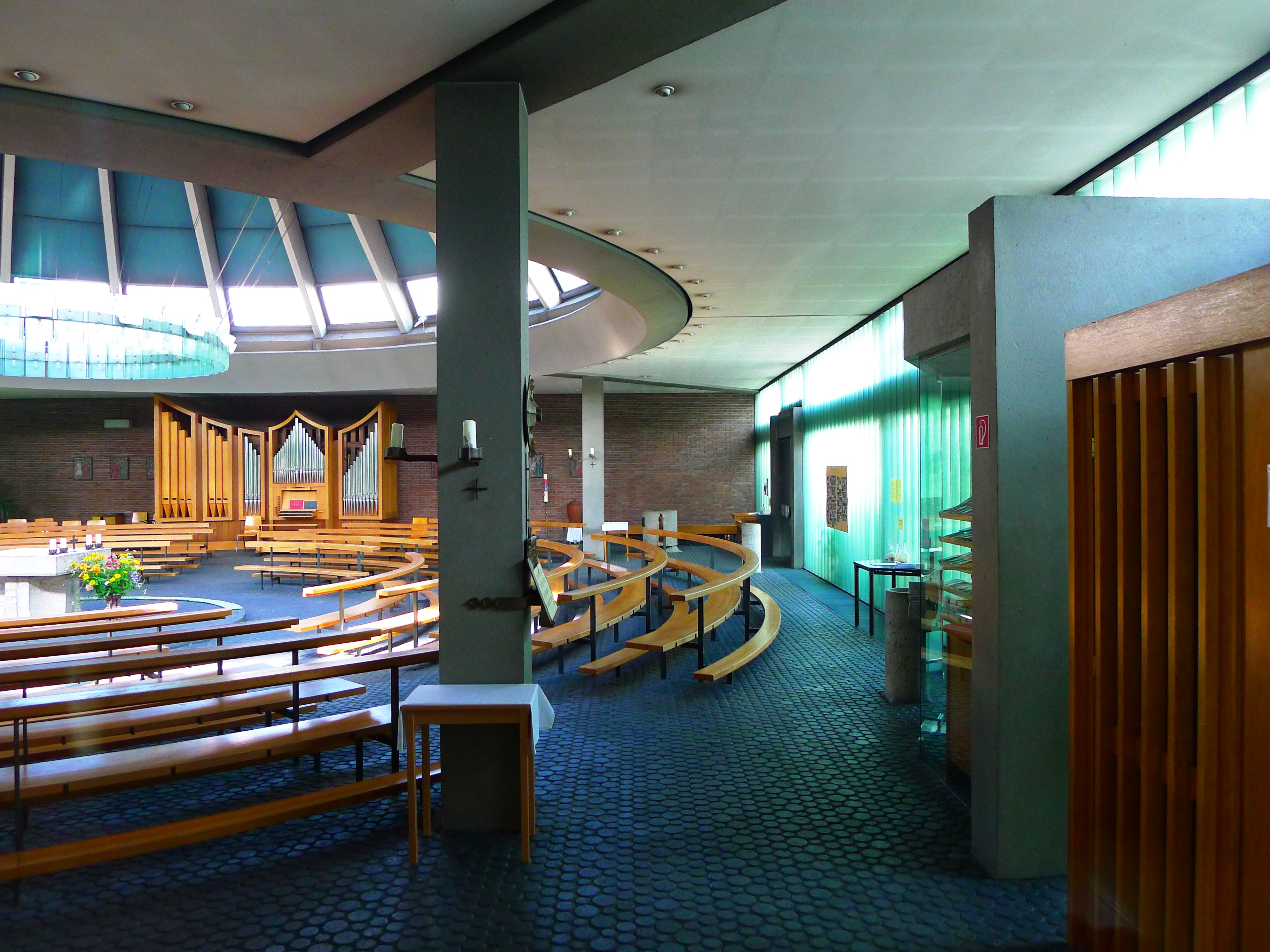 Blick in den Kirchsaal